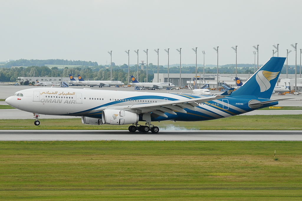 Landet in München RWY 26L